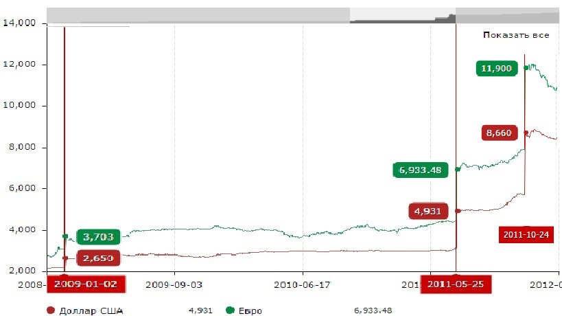 Курсы доллара и евро после открытой девальвации в Республике Беларусь